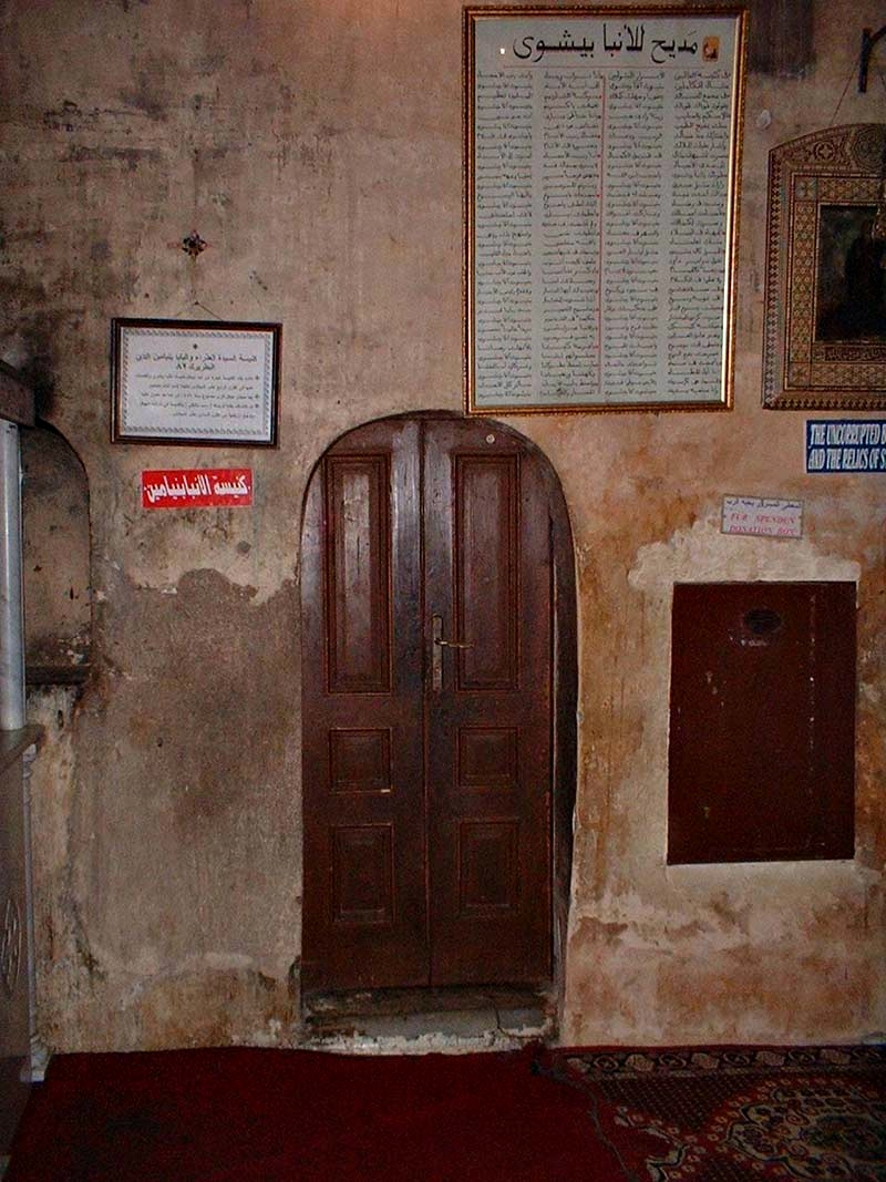 كنيسة السيدة العذراء والأنبا بنيامين الثاني بدير الأنبا بيشوي، وادي النطرون